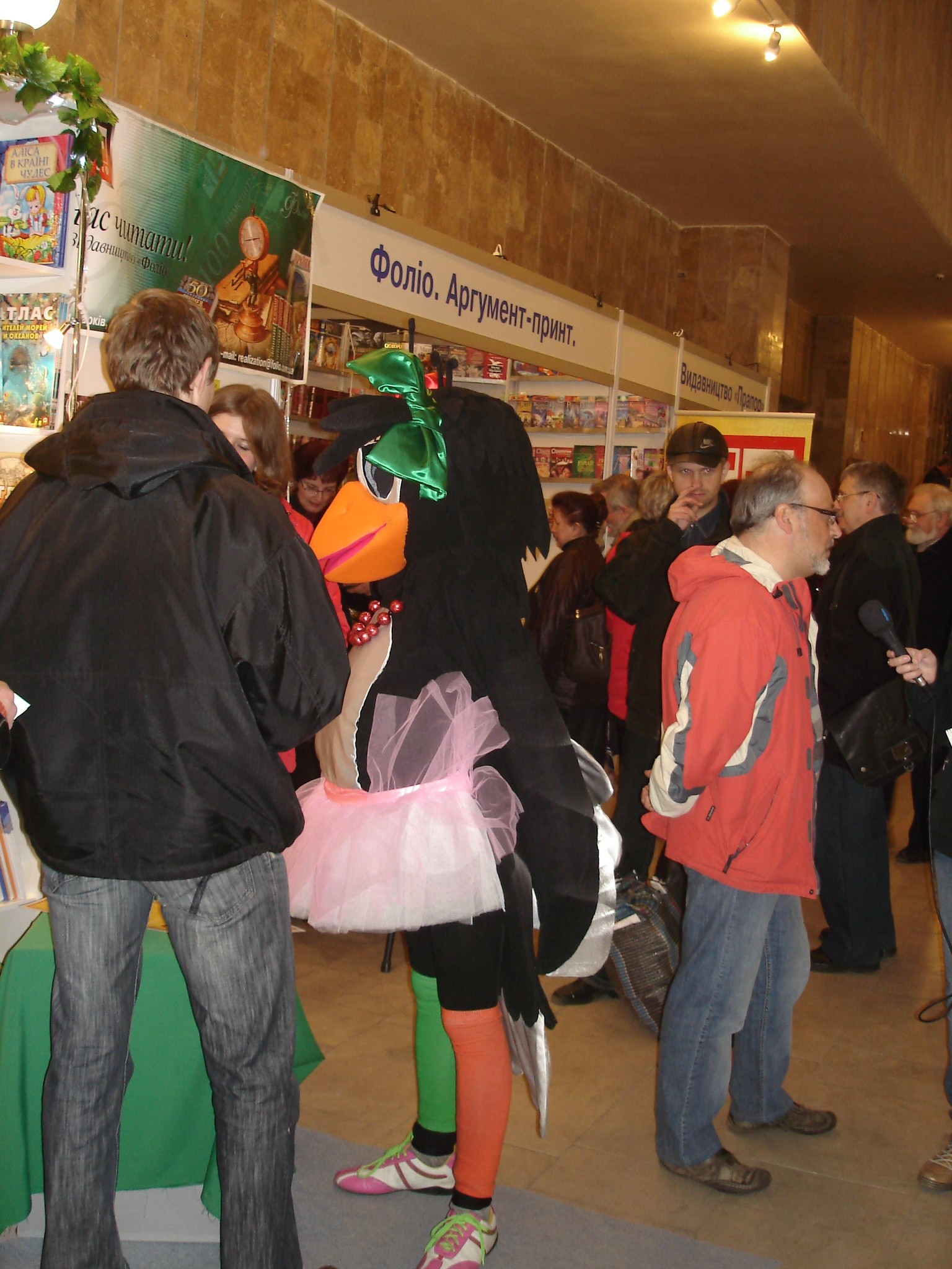 Книжковий виставка ярмарок «Світ книги — 2009», який проходив у Харківському академічному театрі опери і балету імені М. В. Лисенка. м. Харків, 23 квітня 2009 року.Ворона біля центрального входу на виставку-ярмарок. В кадрі також стенд видавництва «Фоліо».